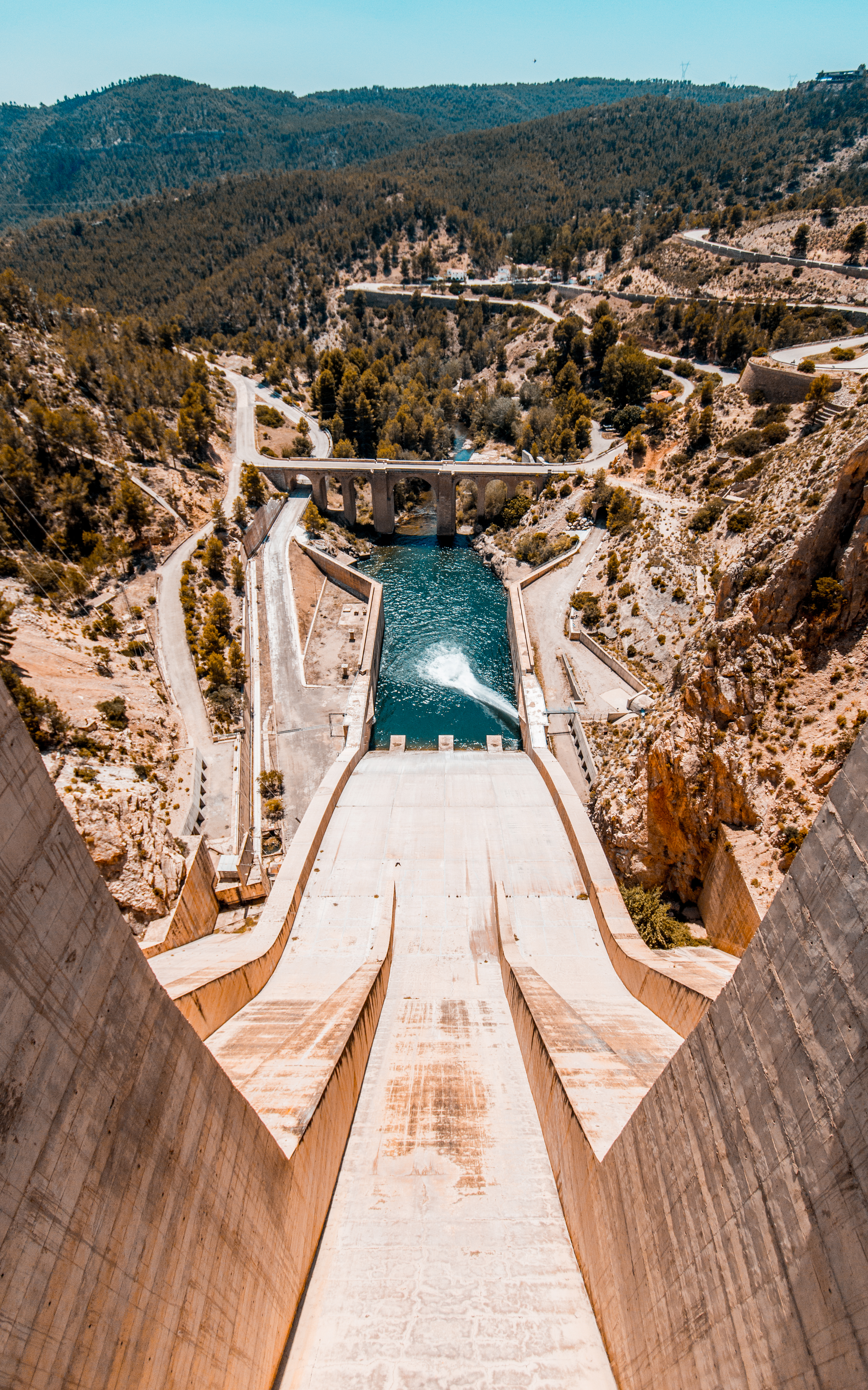 Embalse de Contreras al mediodía